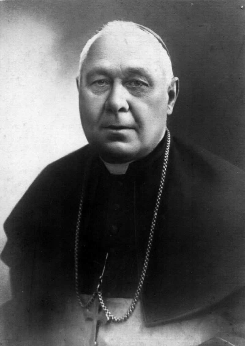 Abp Leon Wałęga, biskup tarnowski w latach 1901-1933